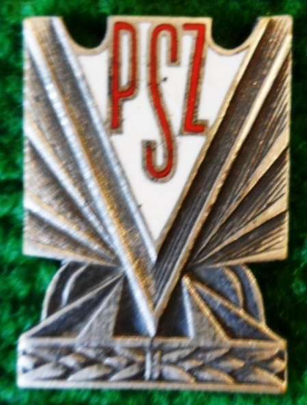 Odznaka PSZ